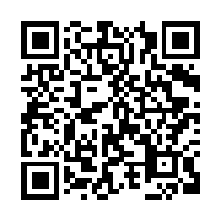 Código QR portada de wikipedia en galego